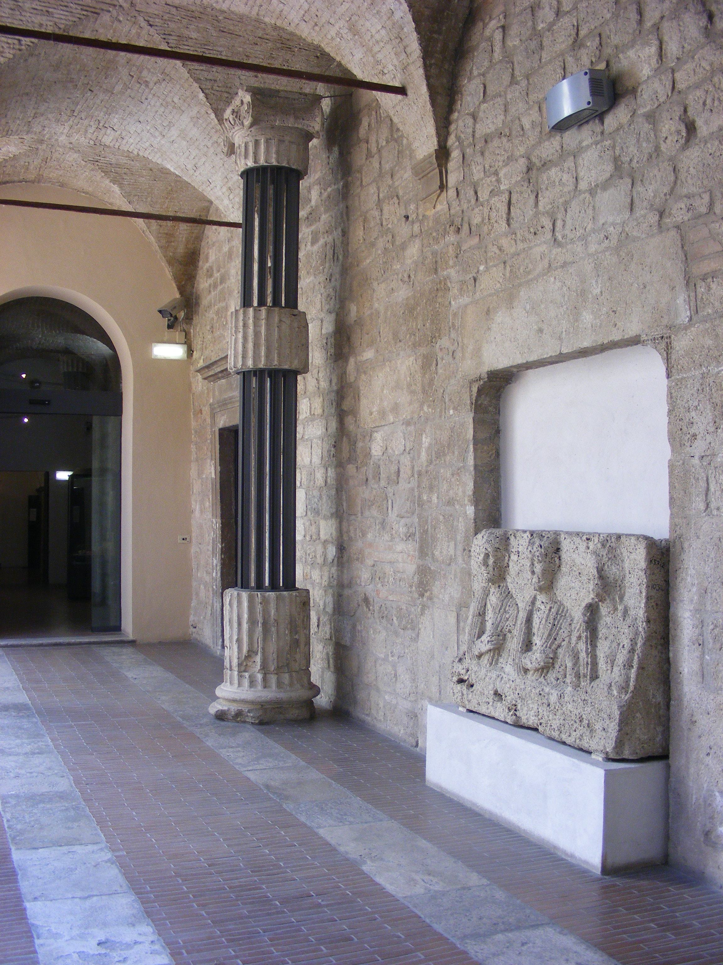 Museo Archeologico Statale di Ascoli Piceno - MIBAC This is a photo of a monument which is part of cultural heritage of Italy.